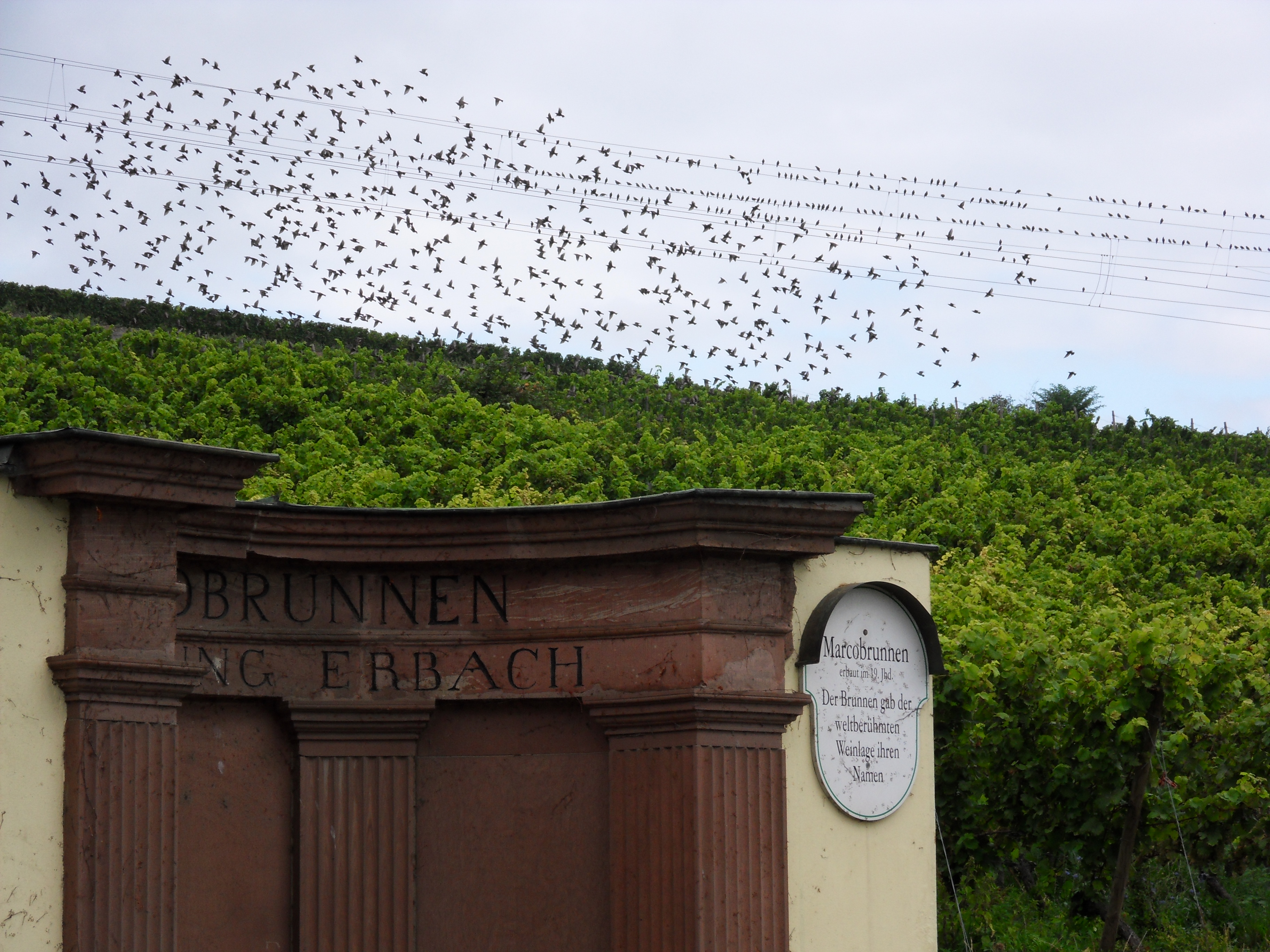 Ein Starenschwarm fliegt von den Rebstöcken der im Erbacher Marcobrunn reifenden Weintrauben auf und setzt sich für eine Fresspause auf die Oberleitungen der Rechten Rheinstrecke.